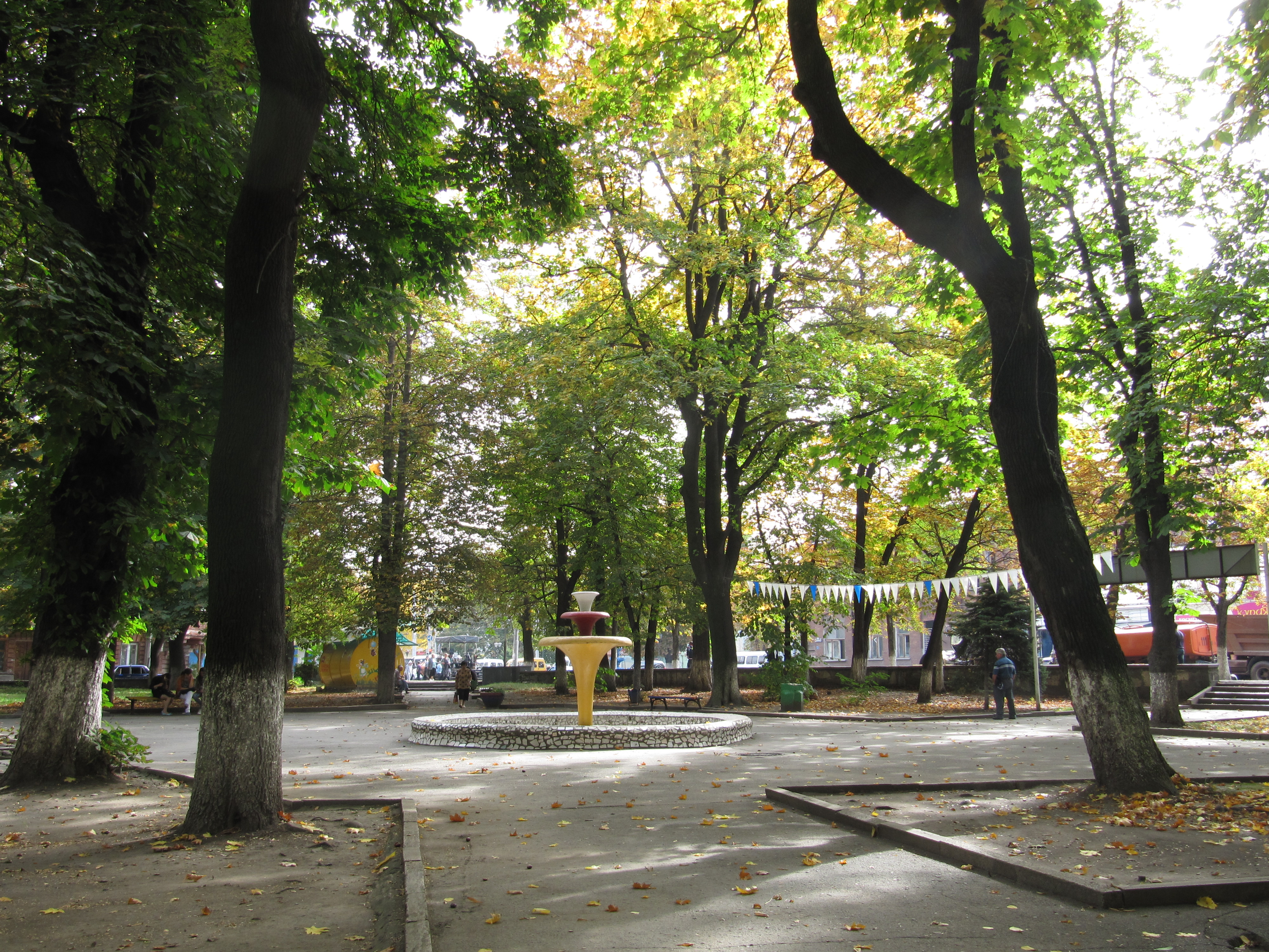 Детский парк имени Жуковского, Владикавказ, Северная Осетия This image is related to the protected area of Russia number 1510153